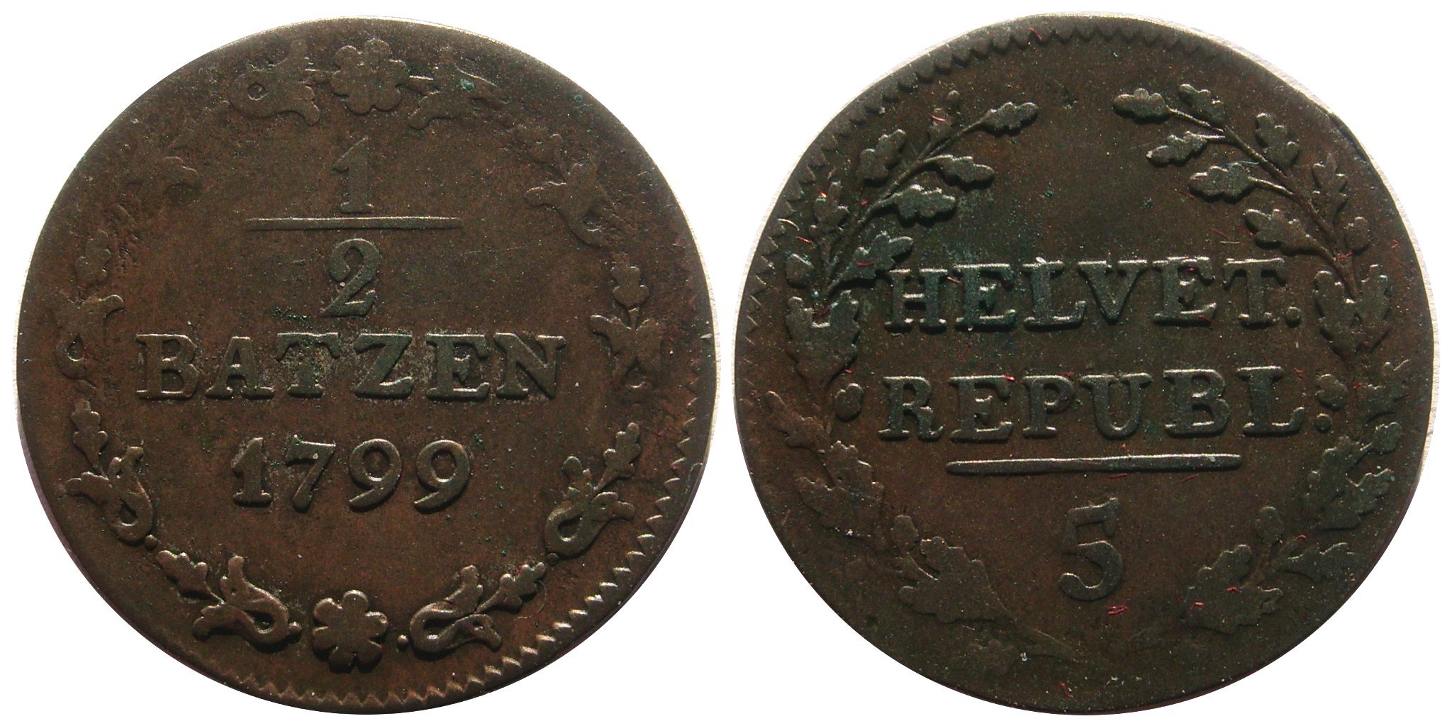 Description Demi batz république helvétique 1799 Date10 April 2009SourceOwn workAuthorJ. Courtois File:Demibatzrephelv1799.jpg Demi batz république helvétique 1799